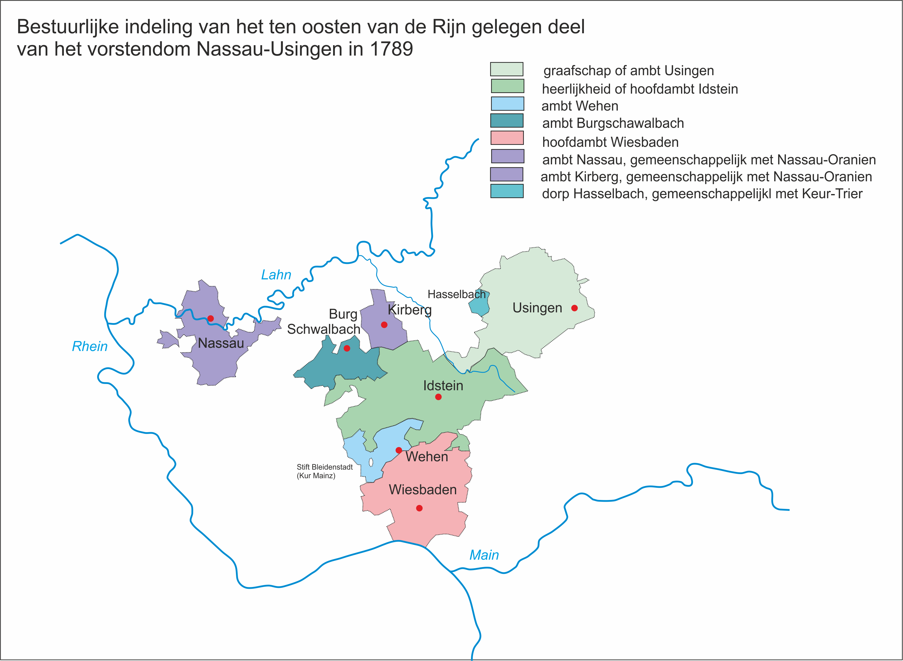 bestuurlijke indeling van het op de oostelijke oever van de Rijn gelegen deel van het vorstendom Nassau-Usingen in 1789